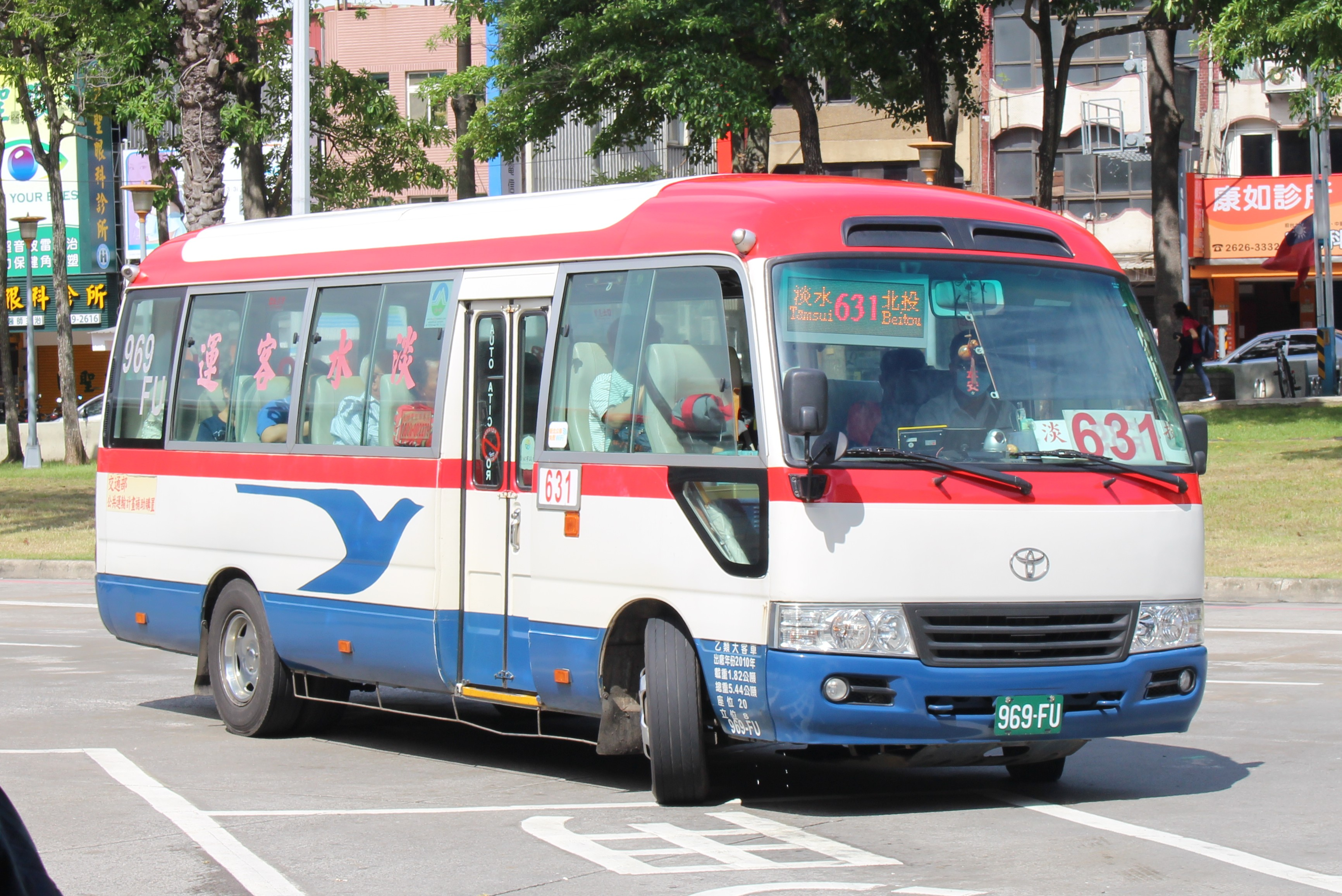 2011 Toyota Coaster XZB50L-ZEMSYR